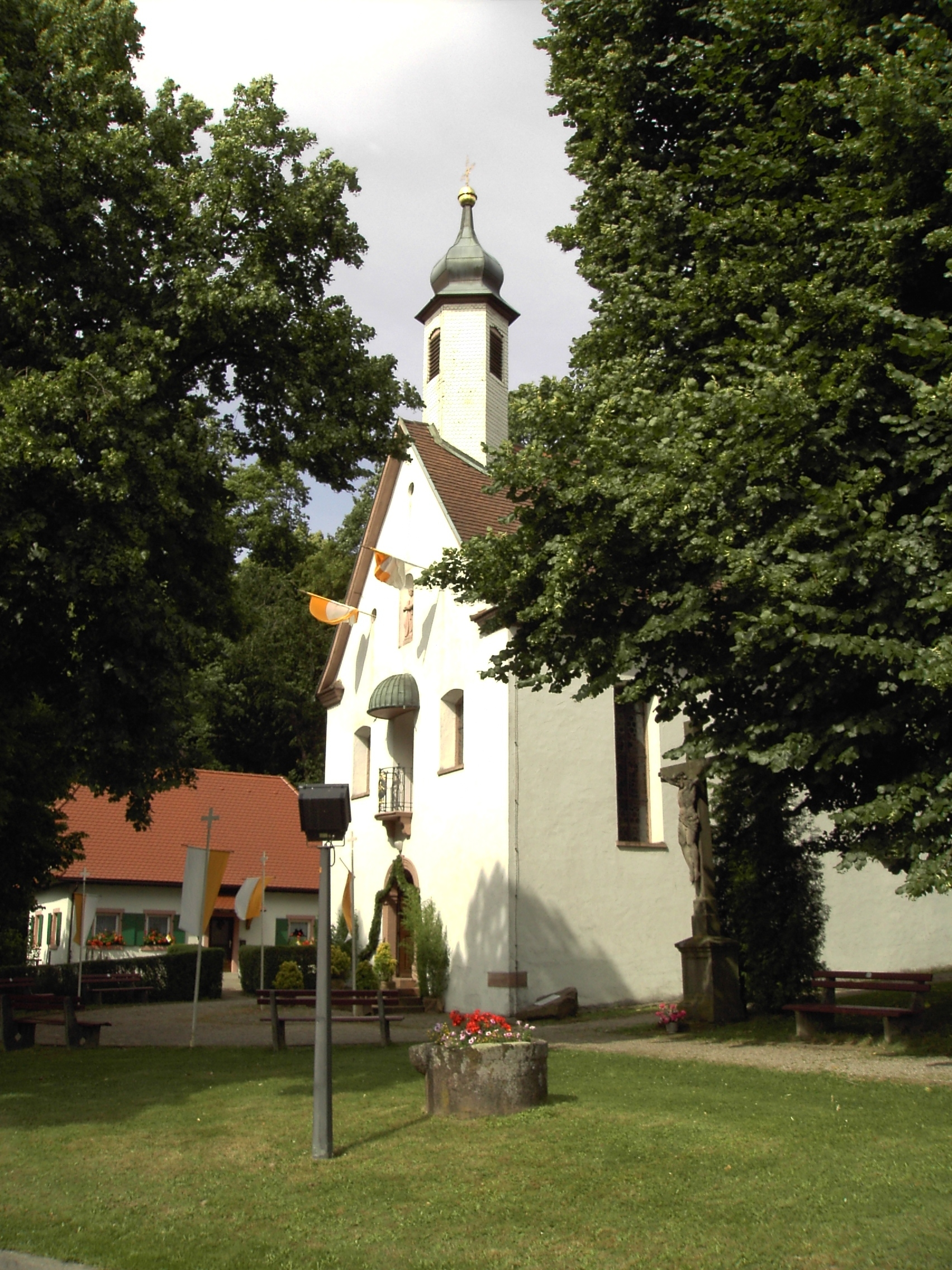 Antoniuskapelle